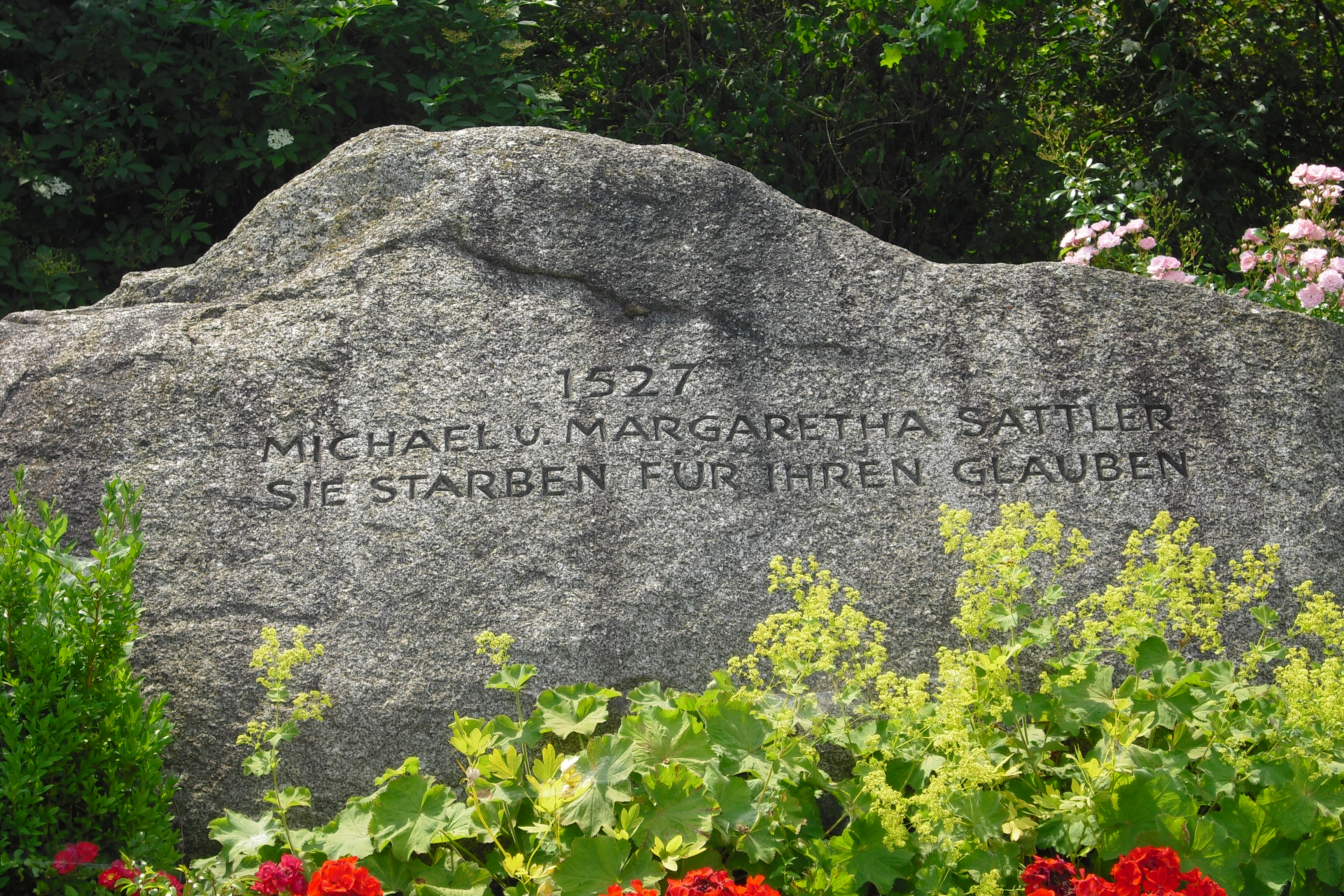 Gedenkstein für die Märtyrer der Täuferbewegung Michael Sattler und Margaretha Sattler in Rottenburg am Neckar (†1527)